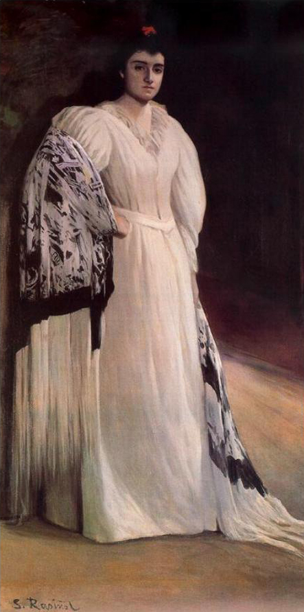 Doña Elena Salvador de Riquelme óleo de Santiago Rusiñol i Prats 1896 Institut del Teatro Barcelona